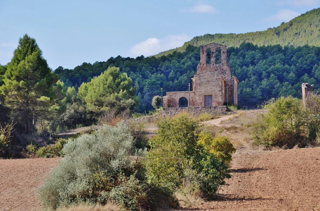 Capella de Santa Maria del Grau (Fonollosa)